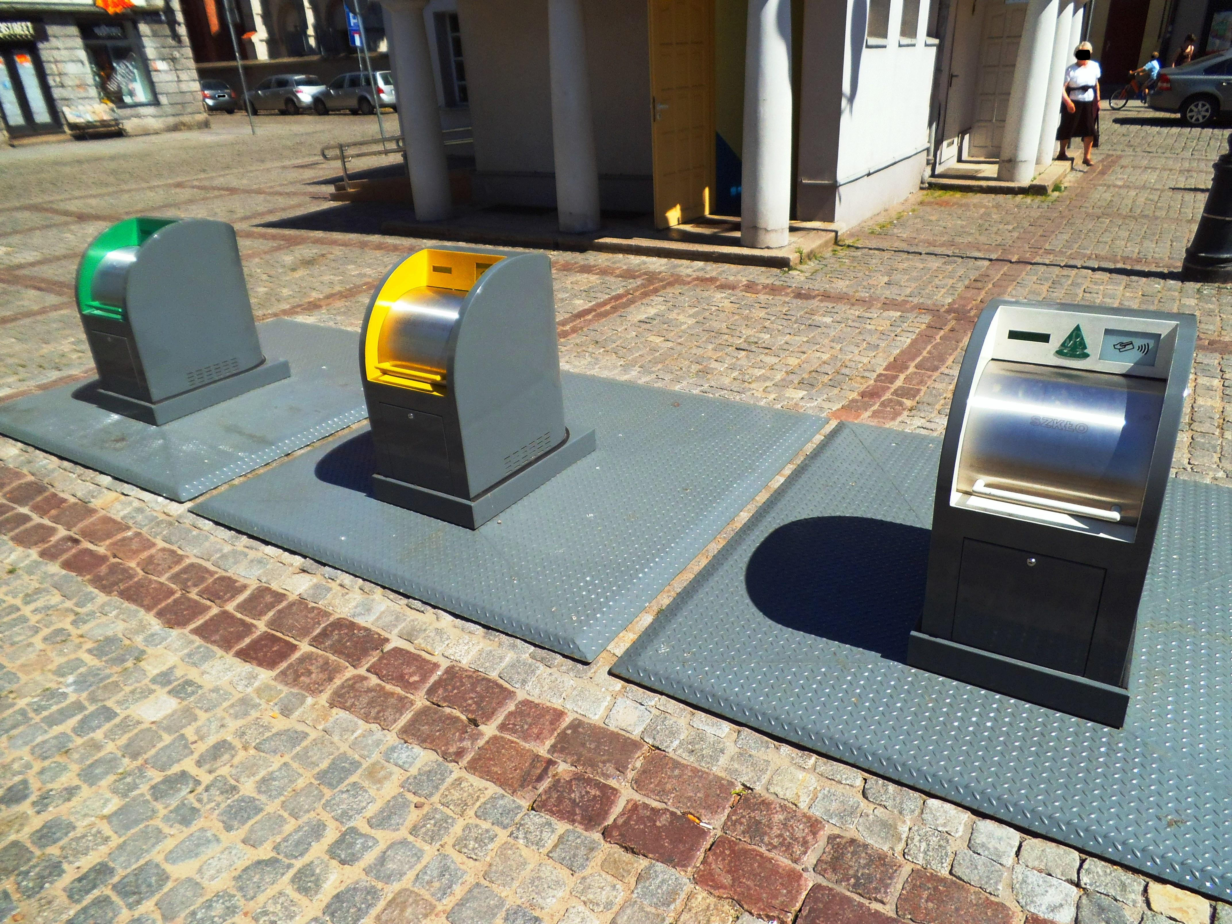 Podziemne pojemniki na odpady w Toruniu